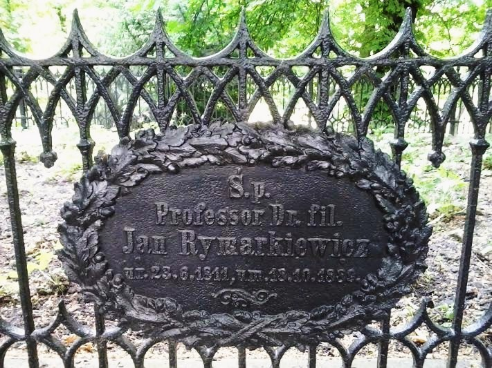 Cmentarz Zasłużonych Wielkopolan. Grób Jana Rymarkiewicza.